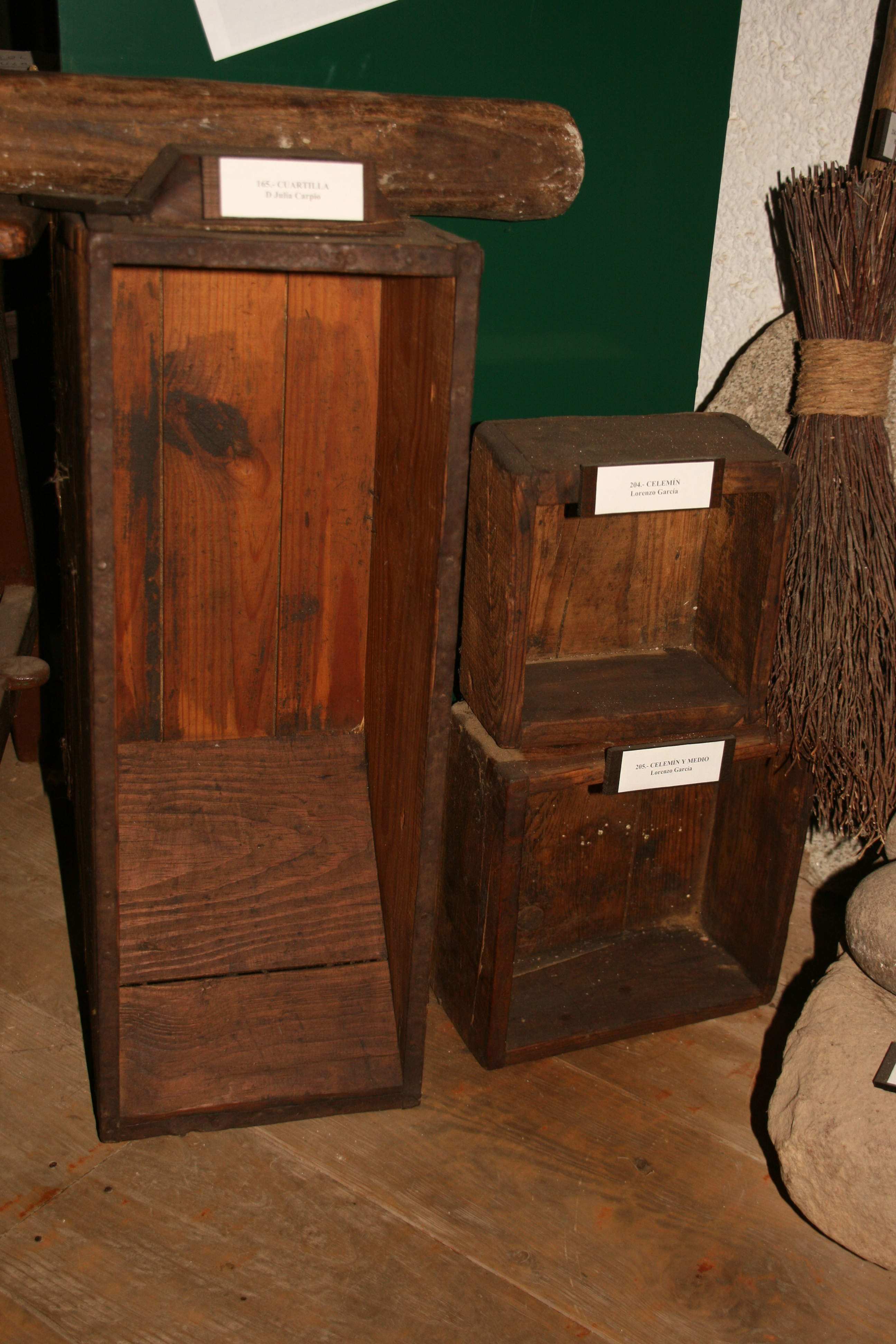 Cuartilla, celemín y celemín y medio. Medidas de cerelaes. Ejemplares en el museo Etnográfico de Horcajo de los Montes.